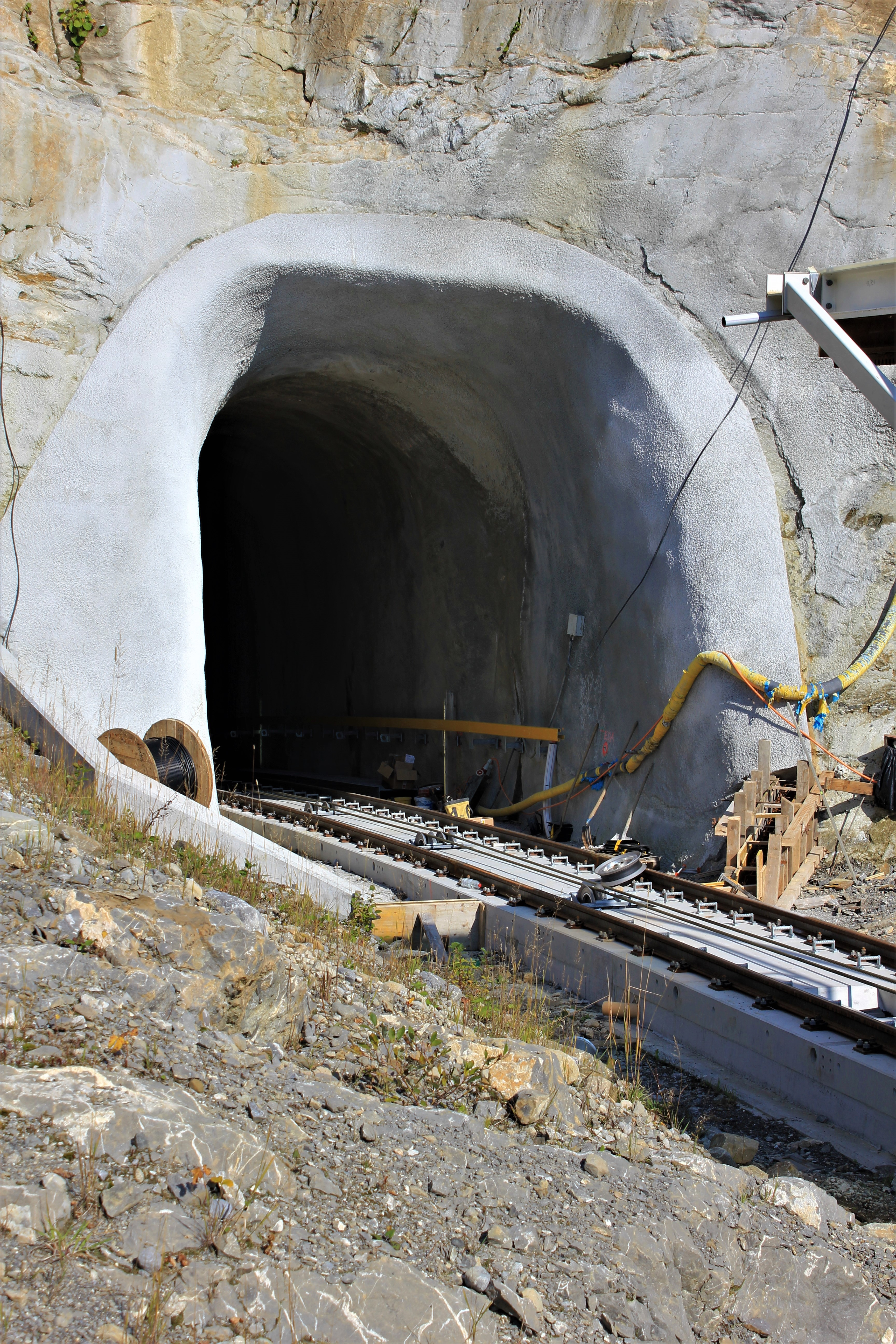 Der Stoosfluhtunnel ist der oberste von drei kurzen Tunnels auf dem Trassee der neuen Standseilbahn auf den Stoos.